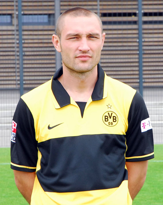 Robert Kovač bei der Mannschaftspräsentation 2007